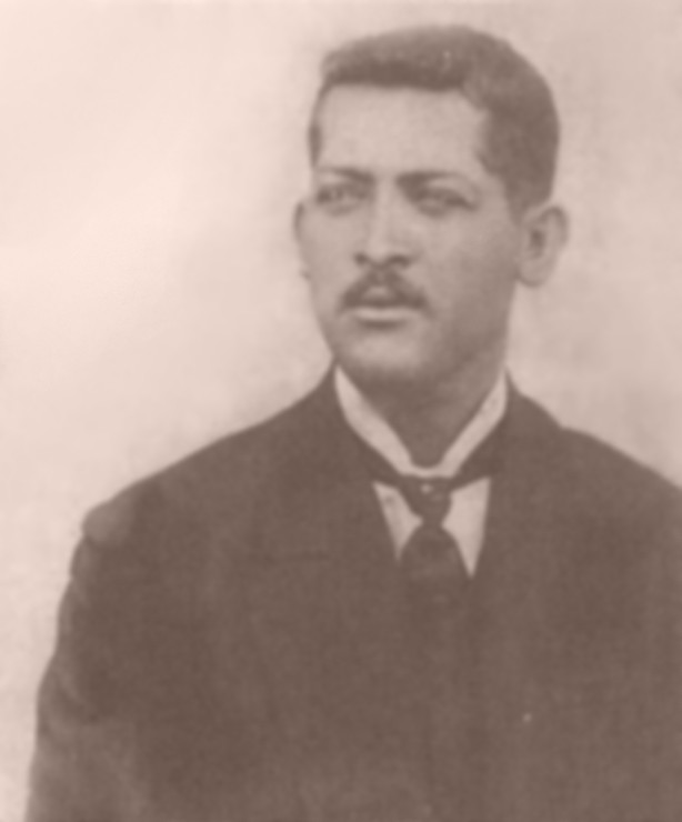 Victor Queiroz de Matos, irmão de Horácio de Matos (1872-1914)